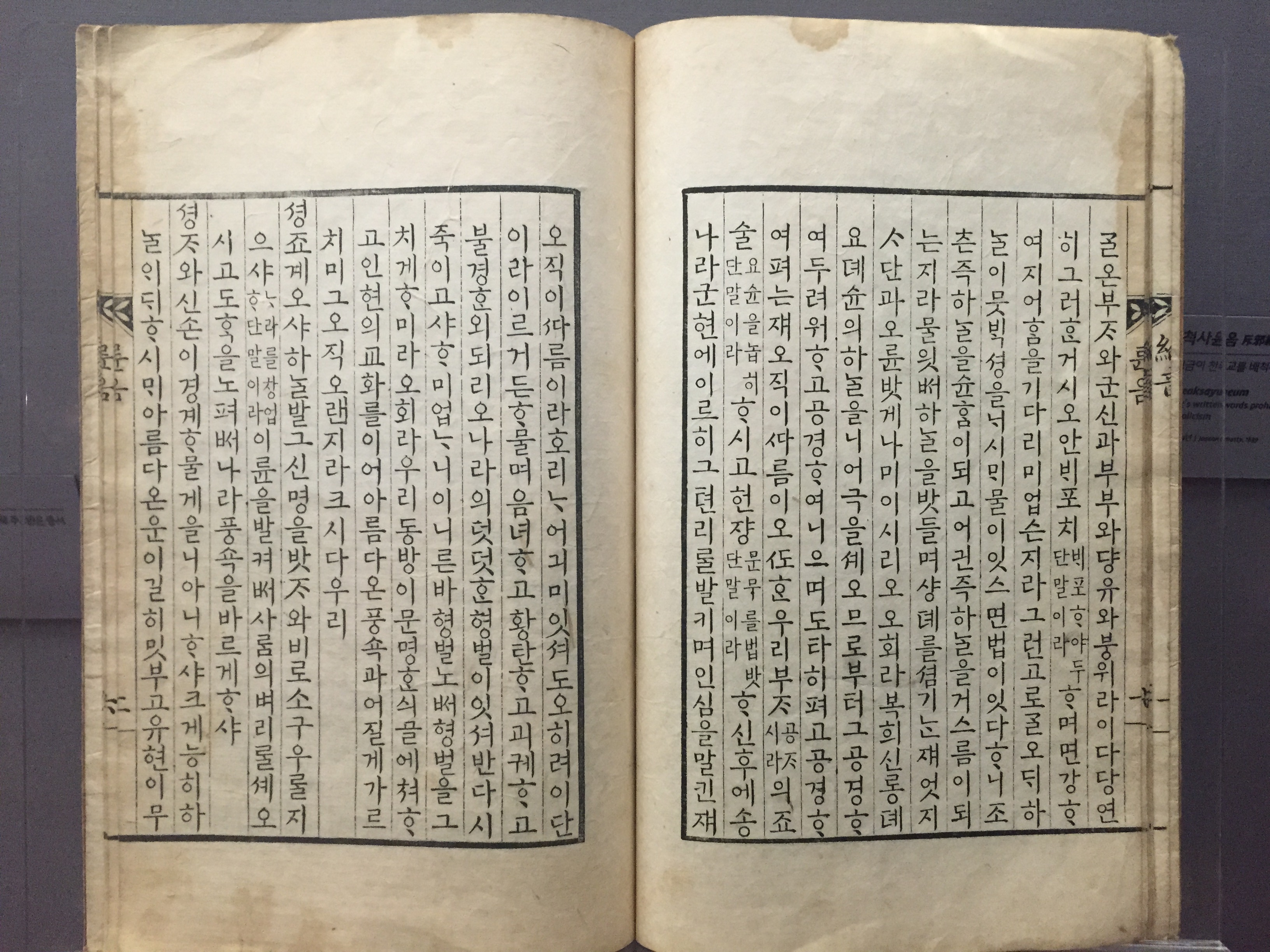 국립한글박물관에 있는 척사윤음